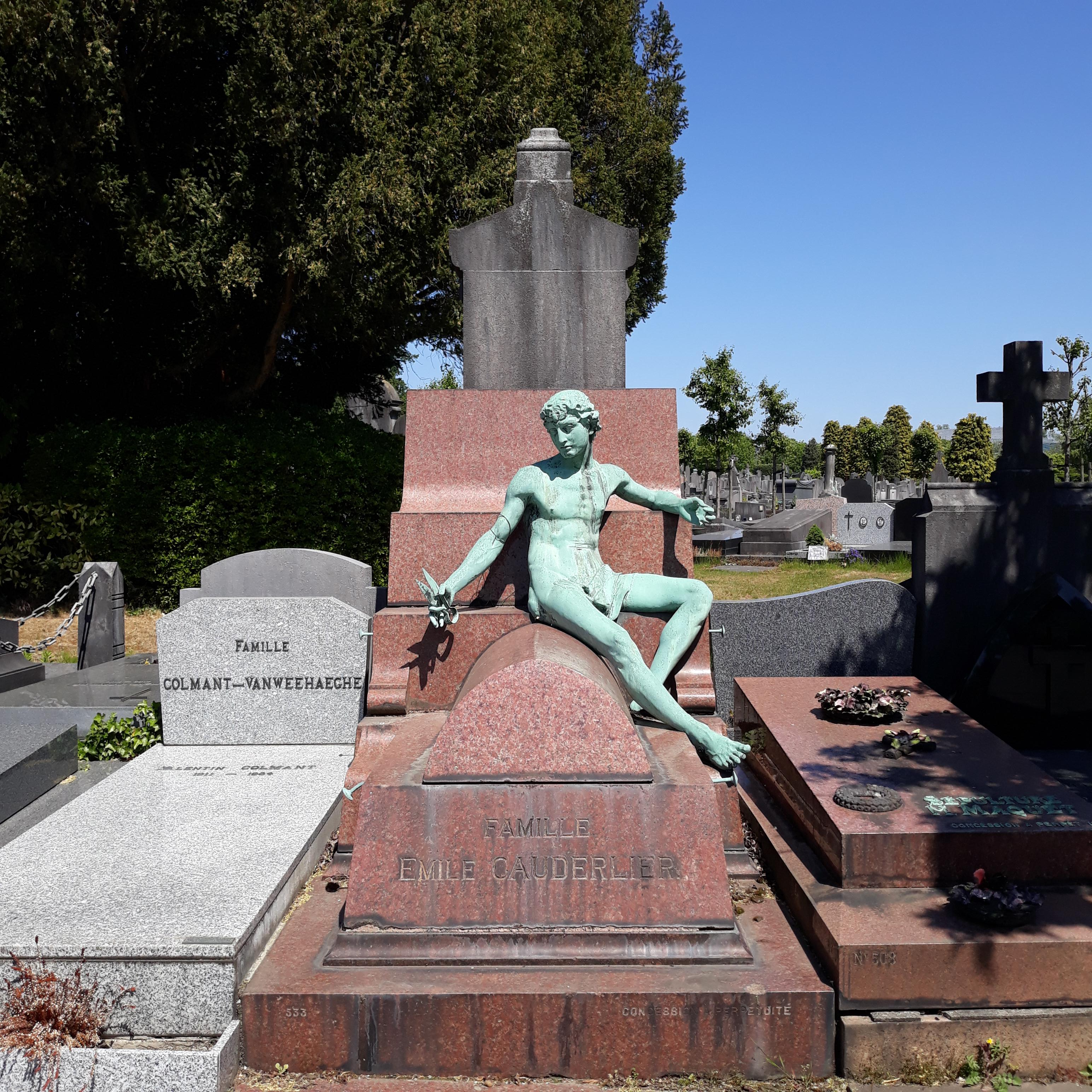 Sépulture en granit rose surmontée d'une sculpture en bronze réalisée par Pieter Boudens.